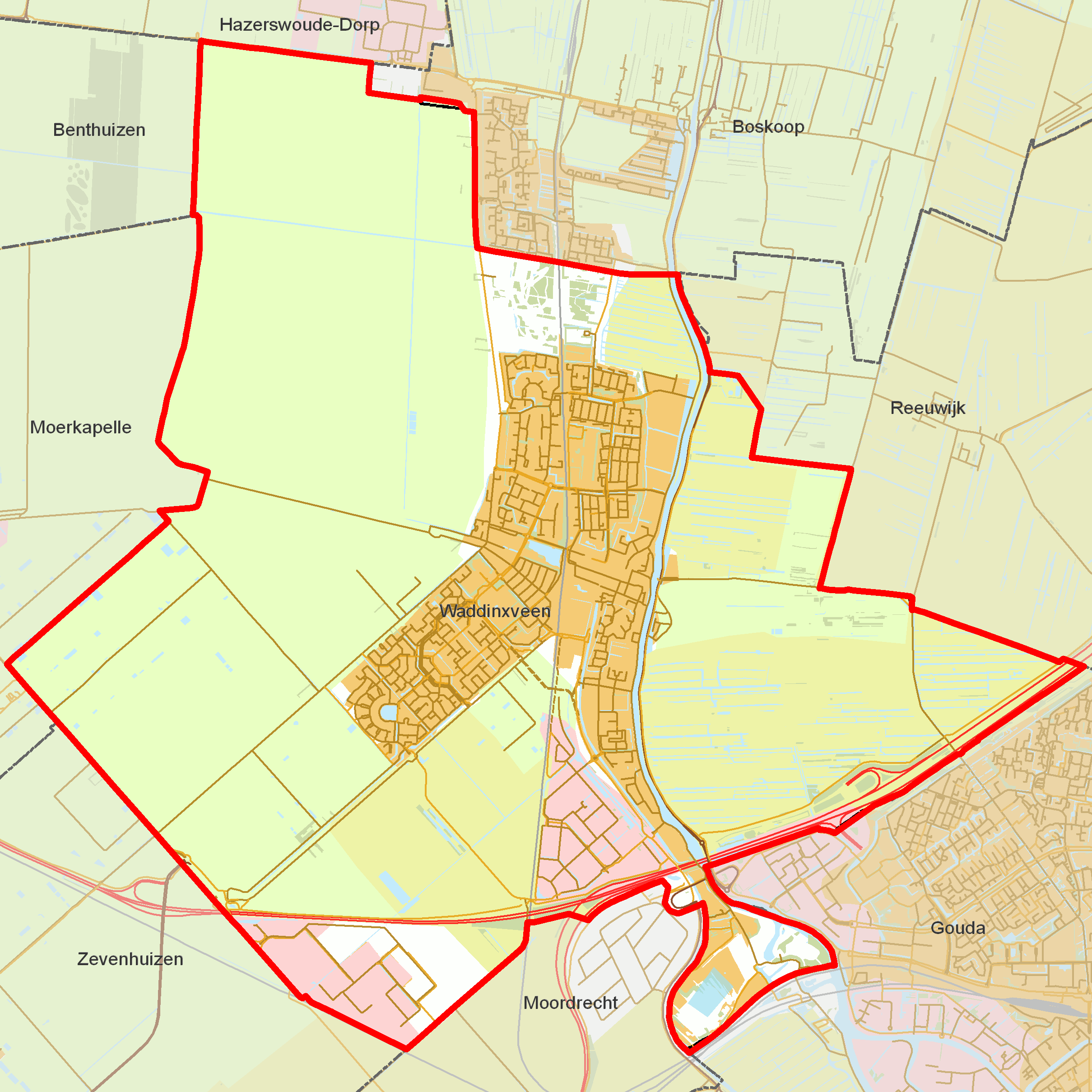 BAG woonplaatsen - Gemeente Waddinxveen.png